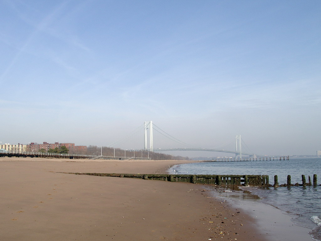 Am South Beach auf Staten Island. Im Hintergrund die Verrazano Narrows Bridge, die Staten Island mit Brooklyn verbindet.